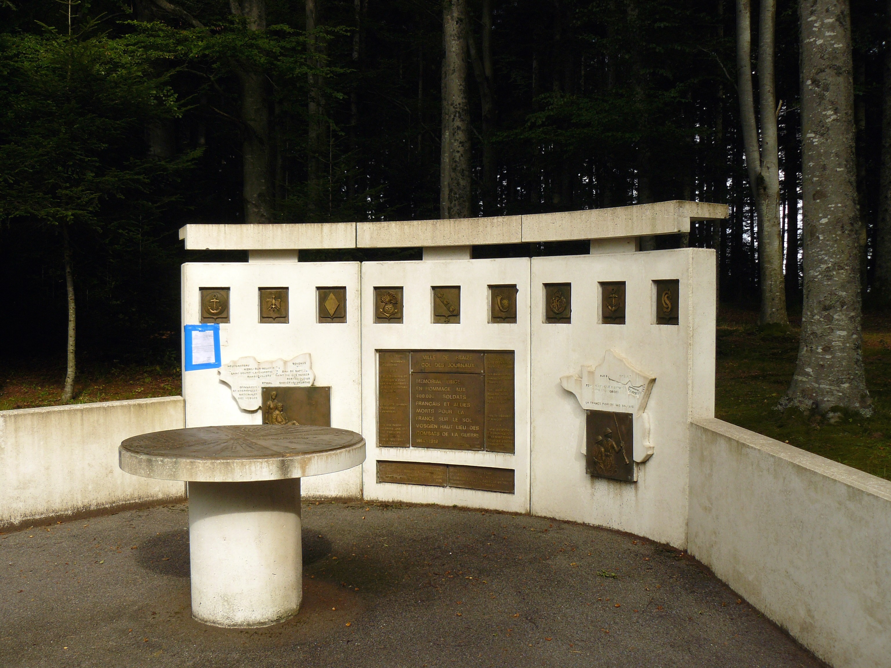 Mémorial de la Bataille des Vosges (Première Guerre mondiale) au col des Journaux (Fraize, Vosges, France)